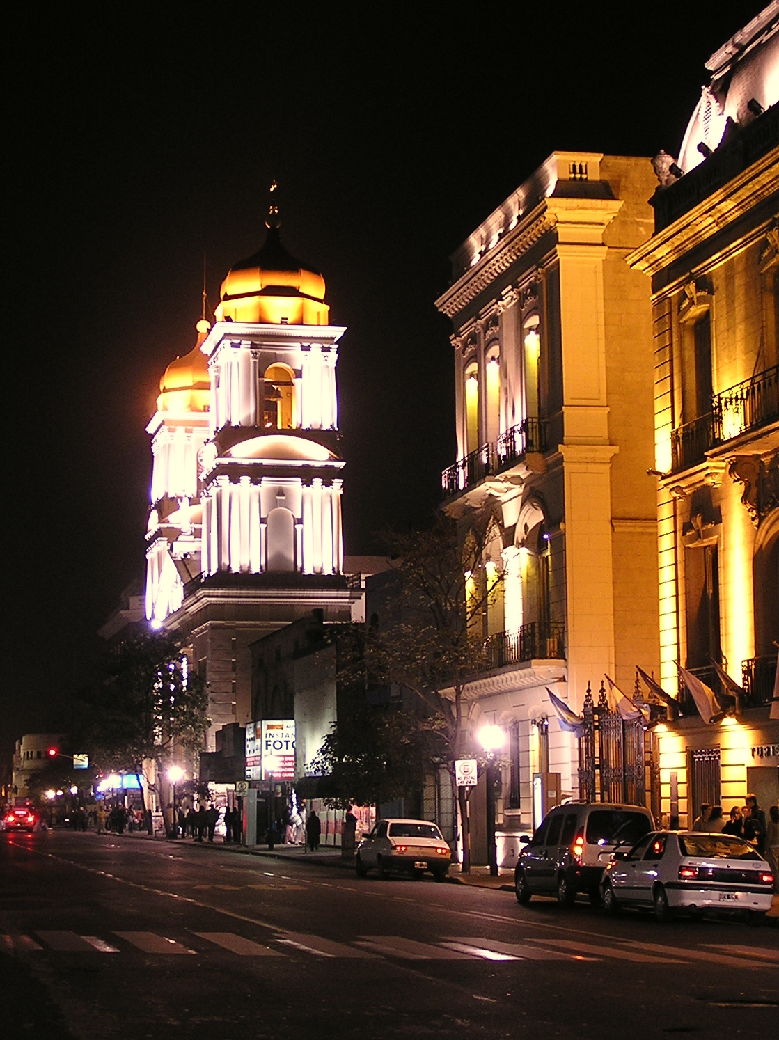 Vista nocturna de la Catedral desde Av. 24 de Septiembre